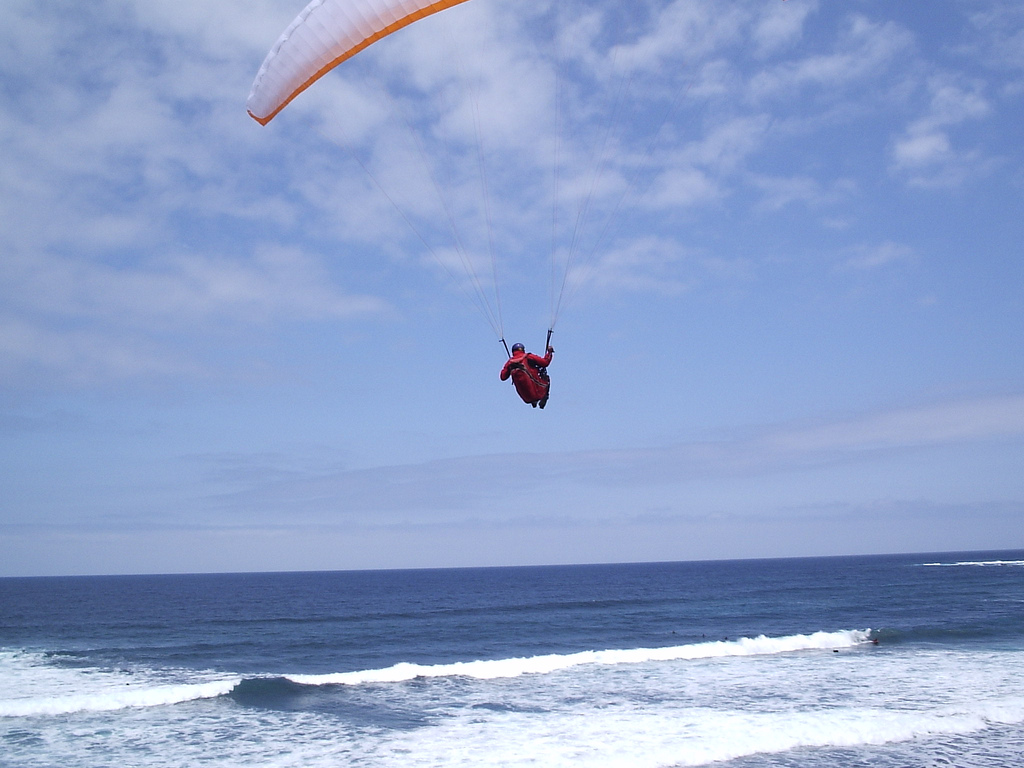 Parapente volando en la Playa del Socorro, Los Realejos (Tenerife).